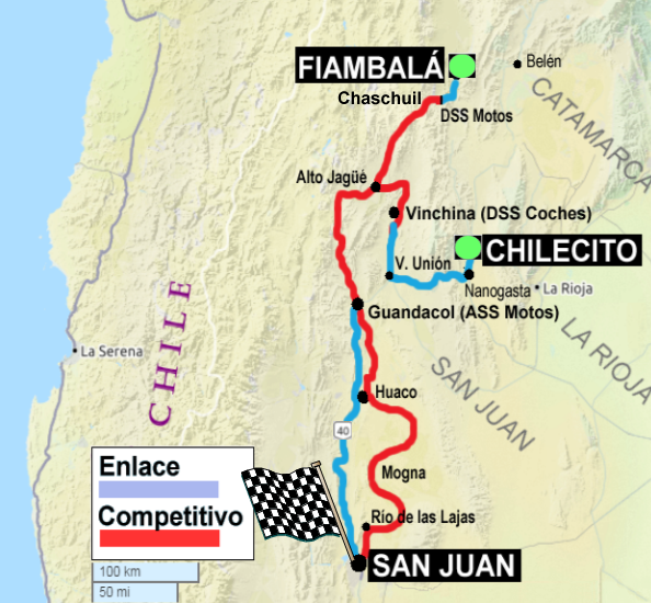 Dakar 2018. Mapa de la Etapa 12.